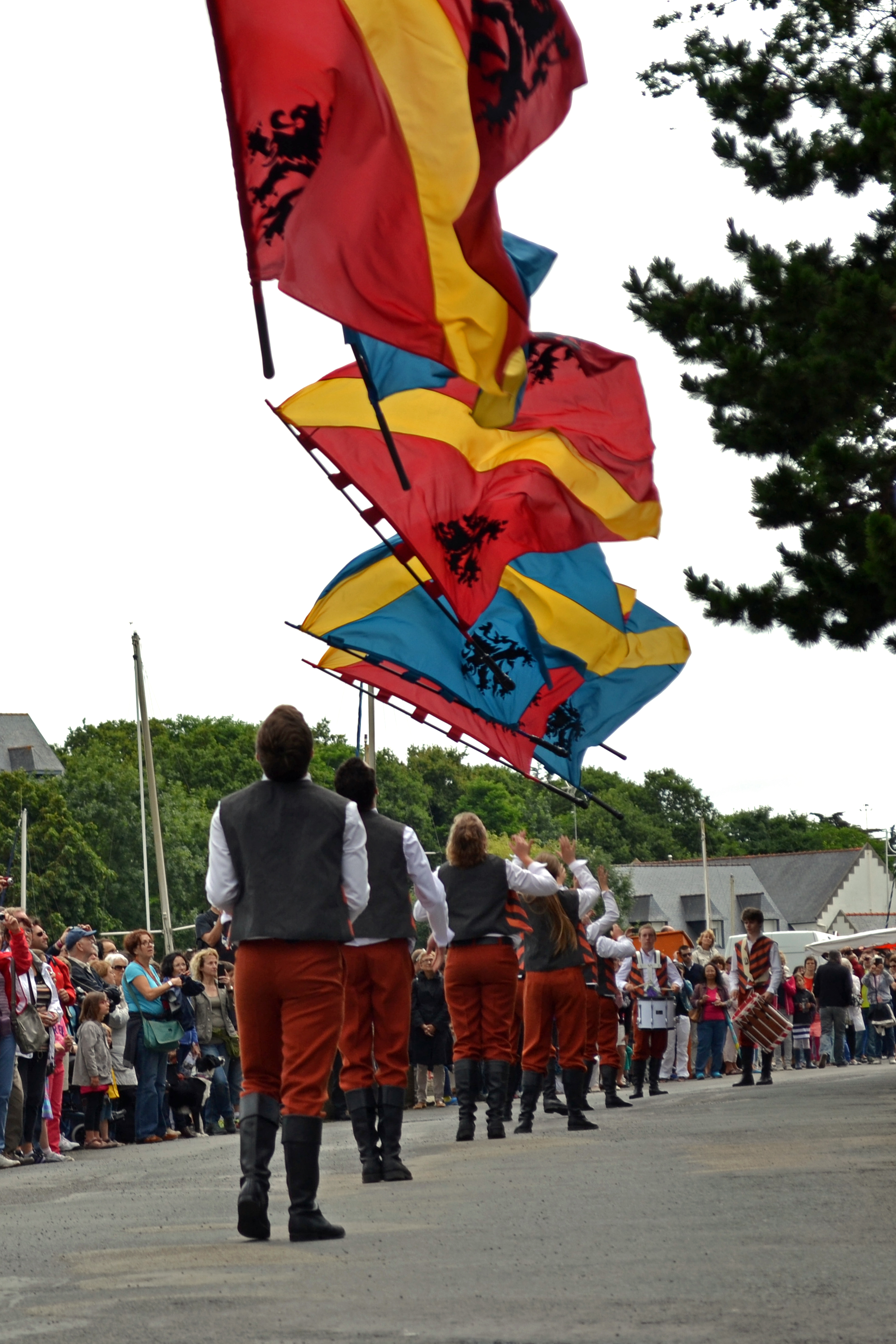 Défilé lors de la Fête des Brodeuses à Pont-L'Abbé le dimanche 13 juillet 2014.